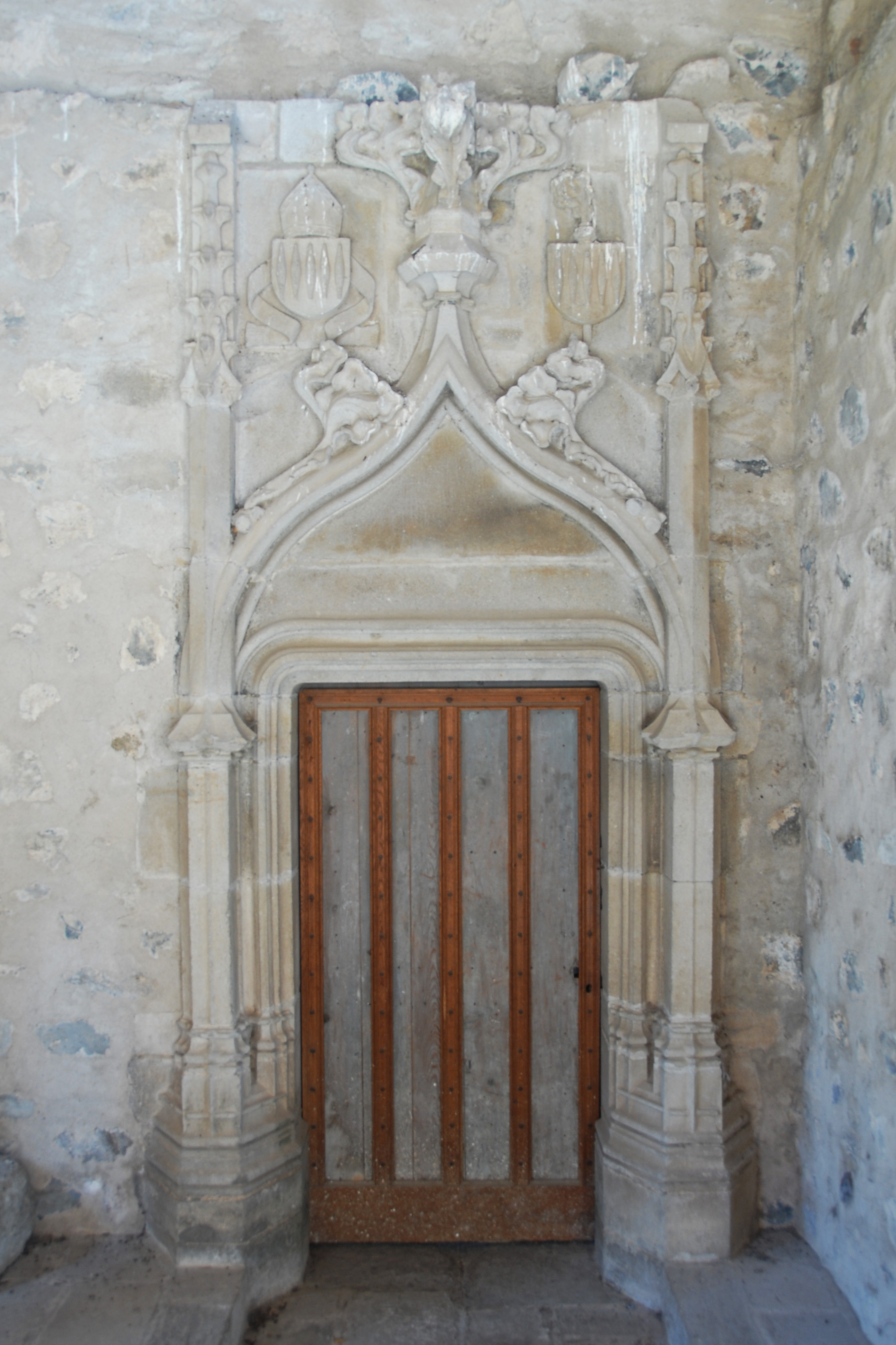 Chanteuges, Kreuzgang, Nordgalerie, Südportal Chap. Ste.-Anne